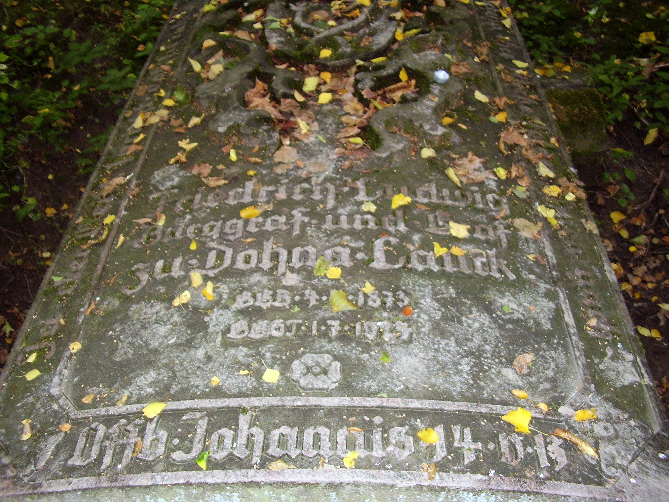 pseudomegalityczny cmantarz rodziny Dohnów (graff zu Dohna)